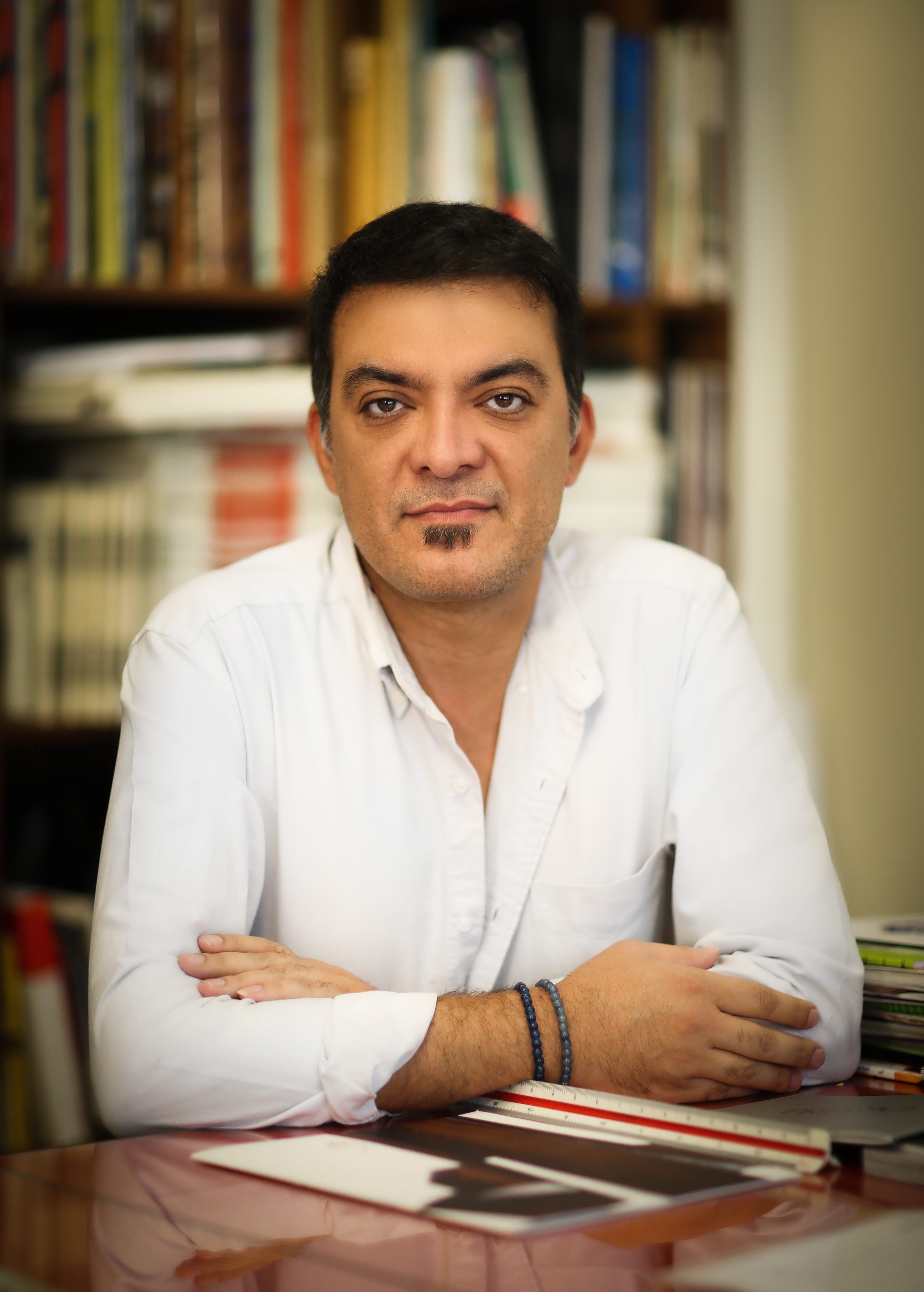 Majid Saeedi Photographer